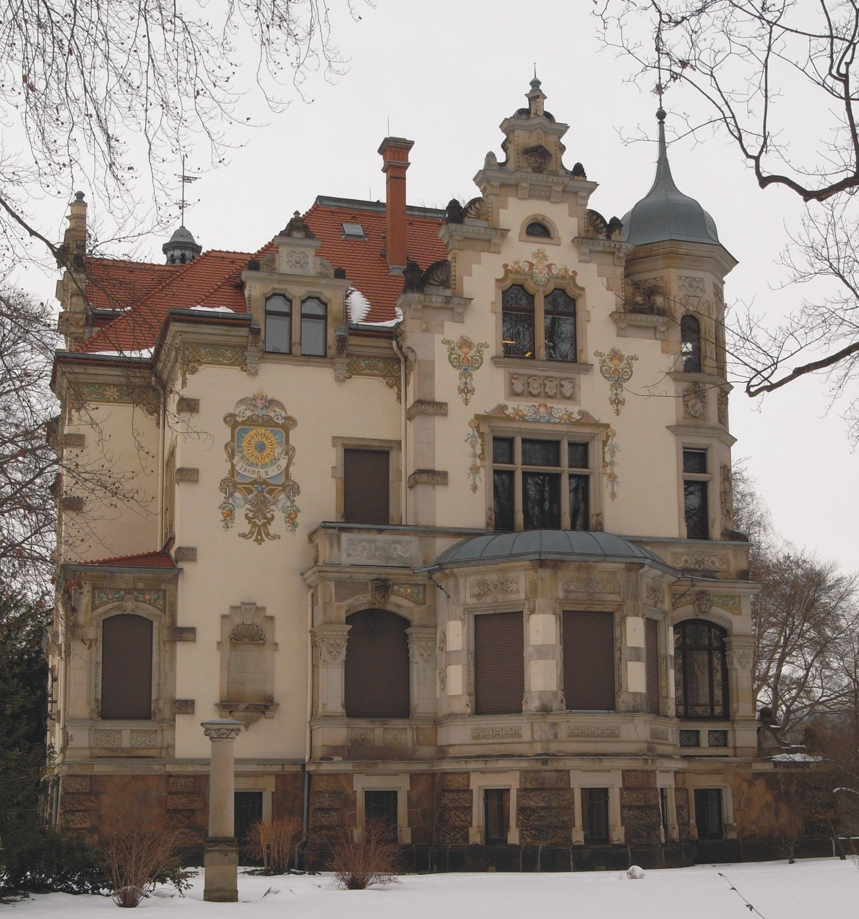 Dresden-Blasewitz, Villa Weigang, Goetheallee 55 (Deutschland, Sachsen), heute Standesamt